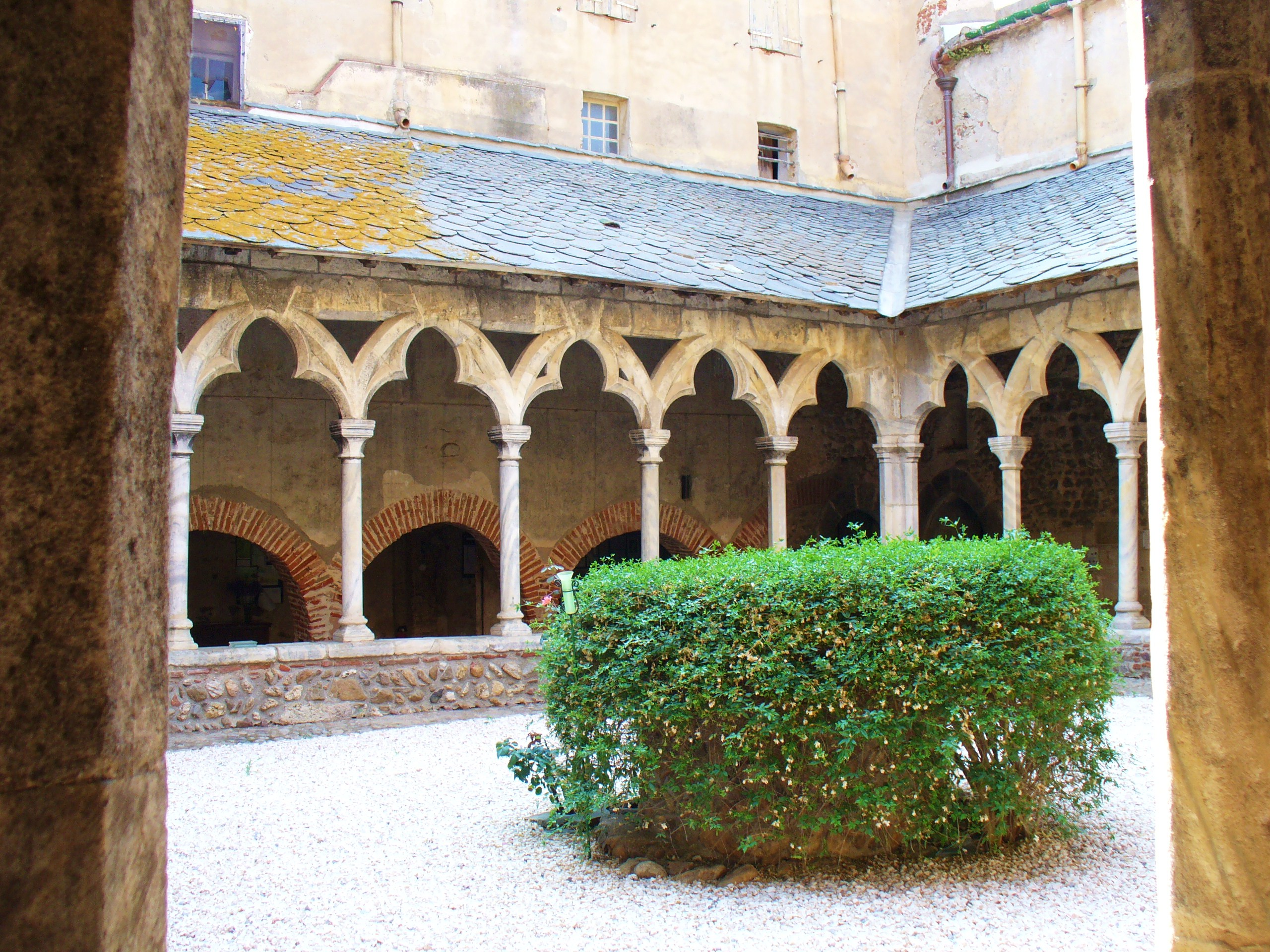 Der Kreuzgang des Klosters Monastir del Camp